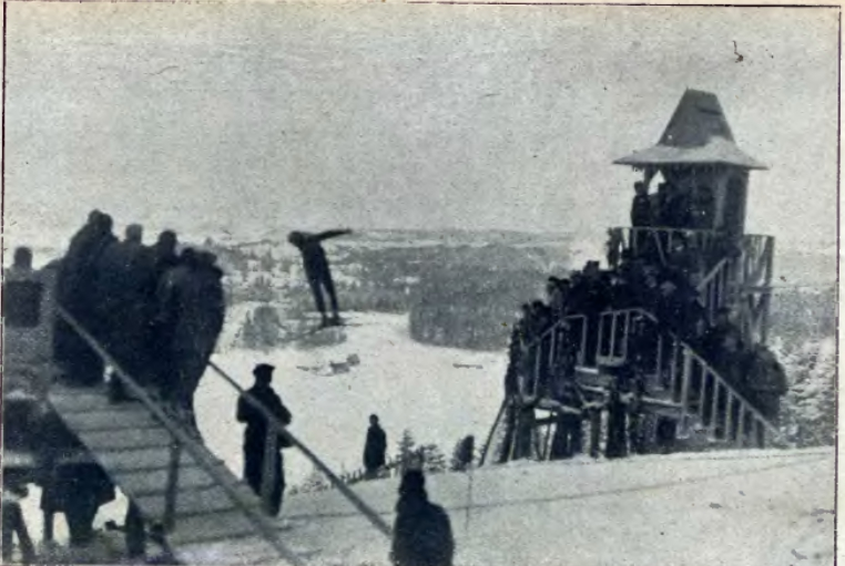 Wielka Krokiew podczas Mistrzostw Świata w Narciarstwie Klasycznym 1929